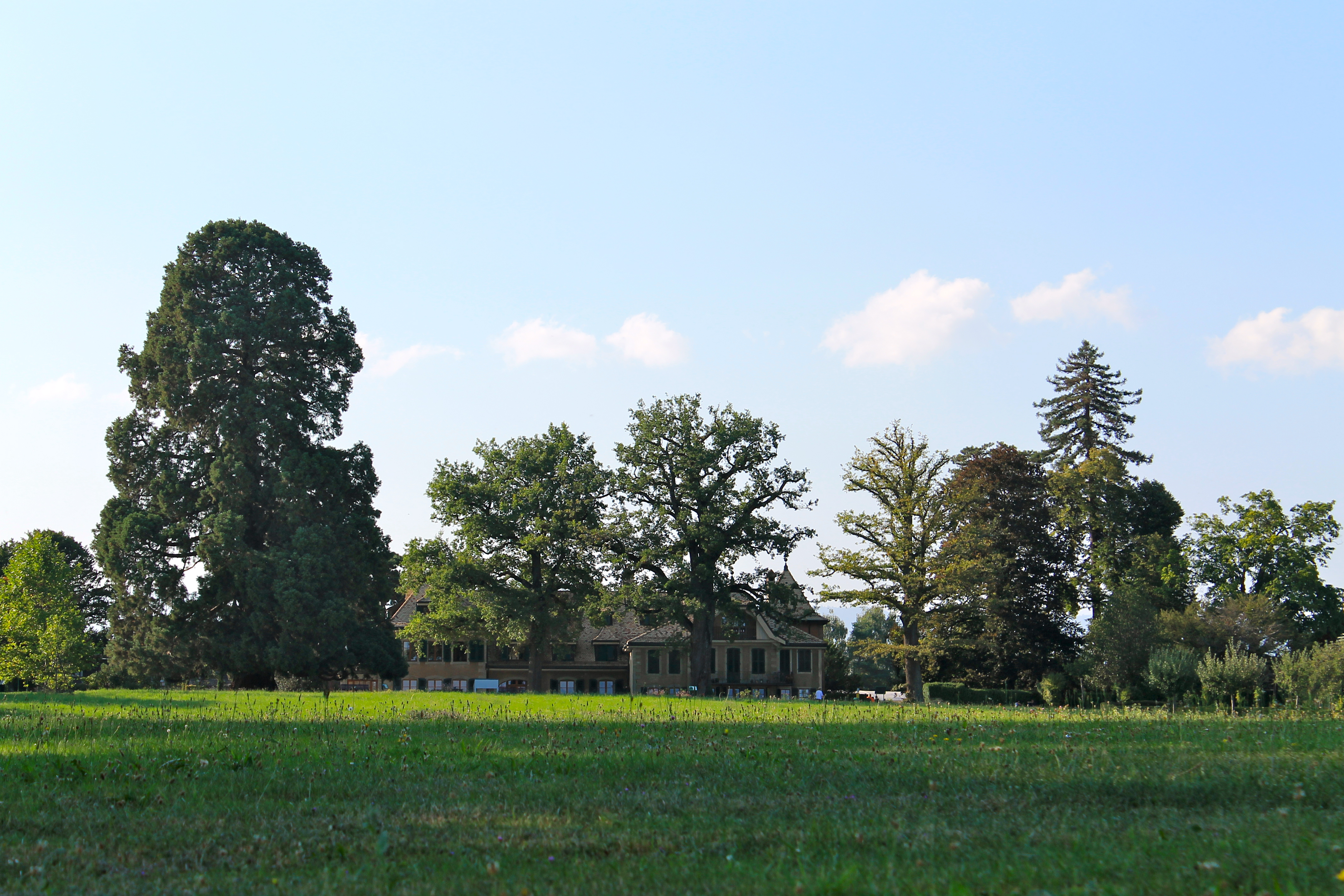 Tannay